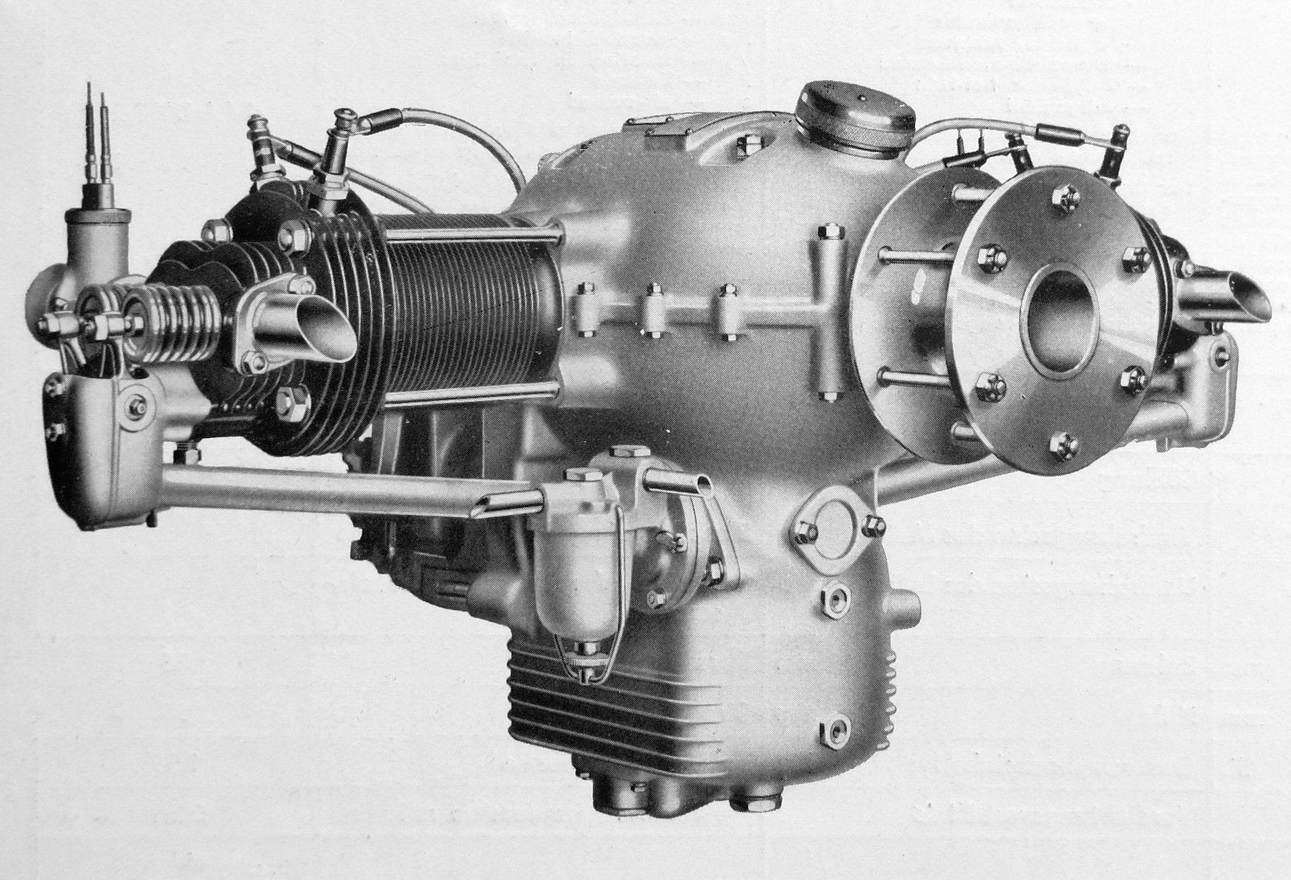 letecký motor Walter Atom (1934)